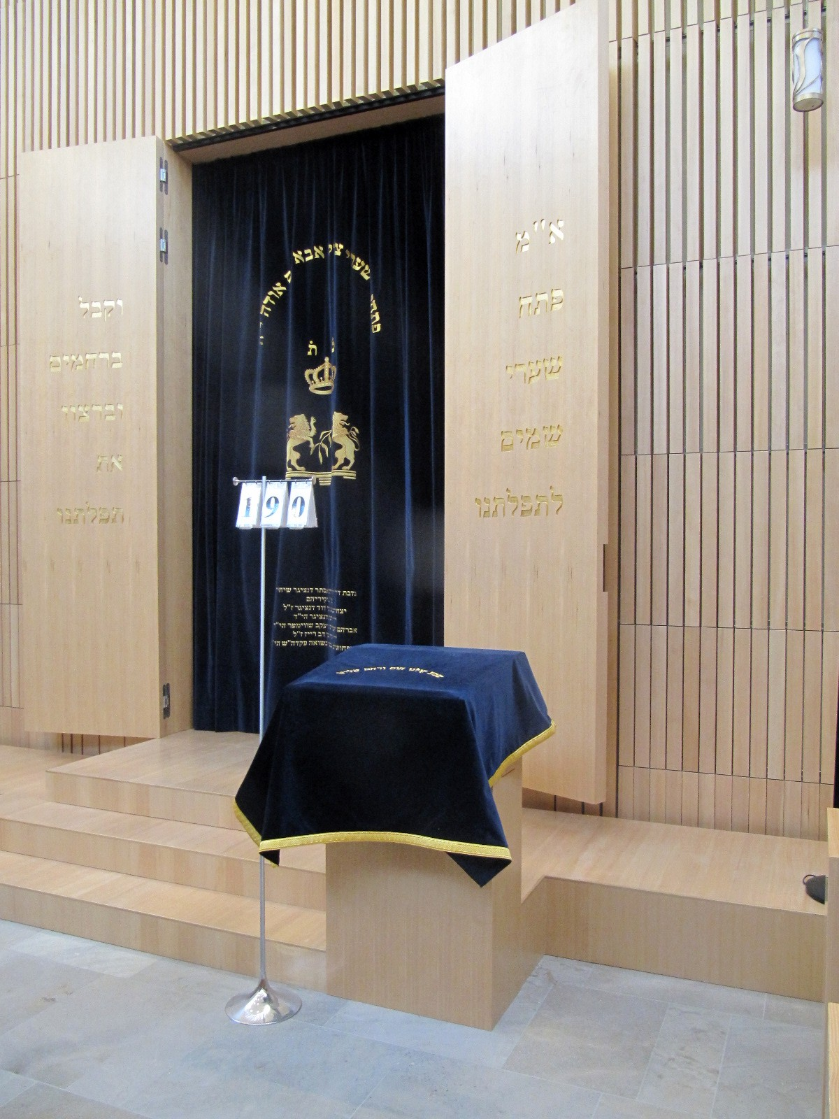 Jüdisches Gemeindezentrum Regensburg